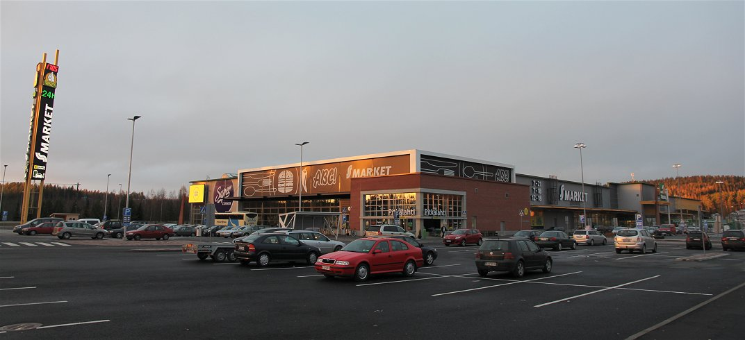 Pitkälahden ABC-liikenneasema, S-market ja Kodin Terra Kuopion Pitkälahden kaupunginosassa. Pitkälahden ABC sijaitsee valtatien 5 läheisyydessä.